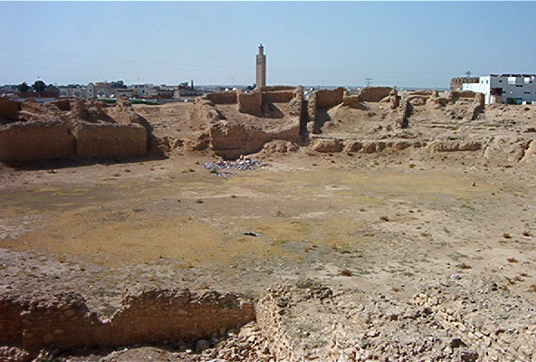 arène de l'ancien amphithéatre d'El Jem